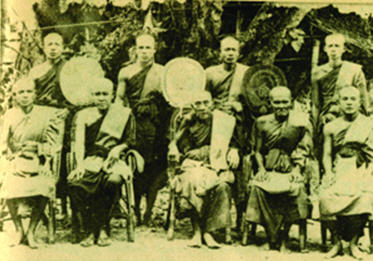 หลวงพ่อกลั่นและศิษยานุศิษย์